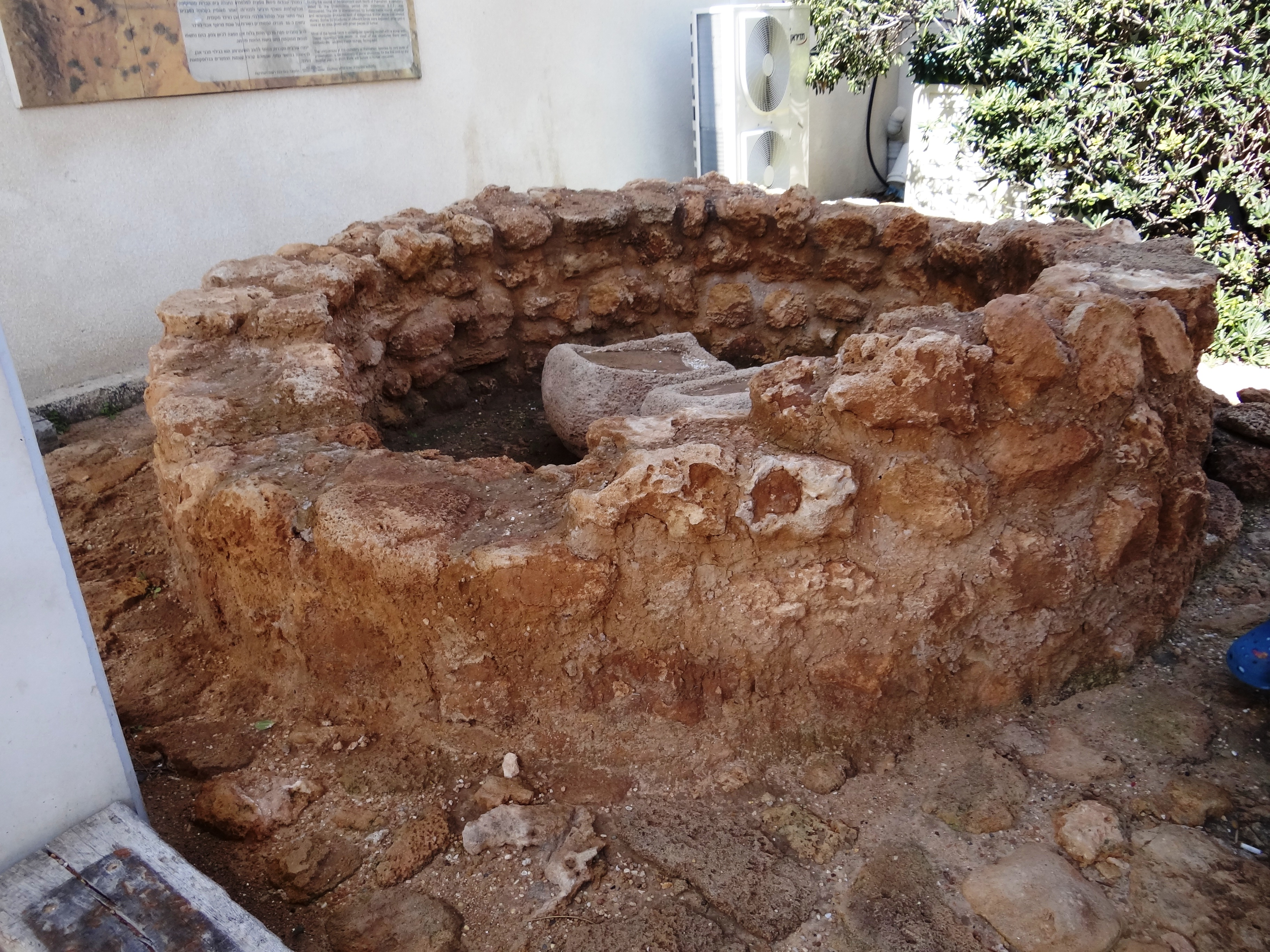 Chalcolithic Round Burial Structures, were found north to kibutz Palmahim in Israel בית קברות מהתקופה הכלקוליתית. האתר מאופיין בקבורה במבנים בעלי מתאר עגול, סגלגל ומלבני בנויים אבן כורכר מקומית. באתר נחשפו 50 מבנים מסודרים בשורות על שטח מרוצף אבני כורכר. האתר נמצ מצפון לקיבוץ פלמחים במישור החוף בישראל דגם של מערת הקבורה בכניסה למוזיאון לארכאולוגיה בית מרים בקיבוץ פלמחים